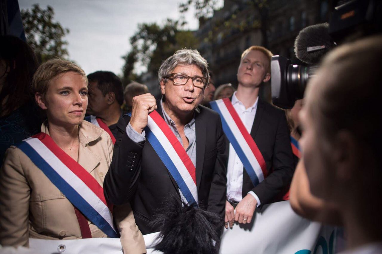 Éric Coquerel - Manifestation des syndicats contre les ordonnances de la Loi Travail